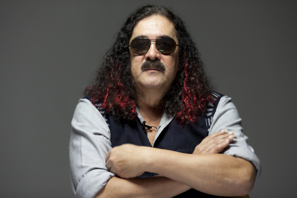 Foto tirada em 26/06/2010 pelo Garapa - Coletivo Multimídia ( Moraes Moreira em entrevista ao projeto Produção Cultural no Brasil: Moraes Moreira é músico e foi integrante do conjunto musical Novos Baianos.